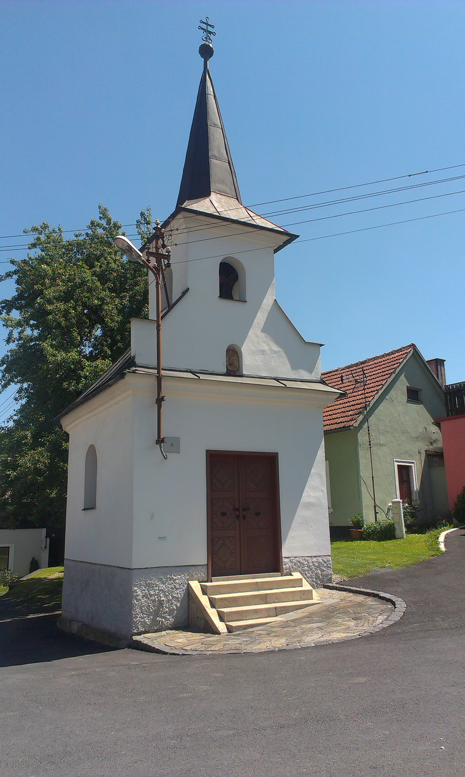 Kaple Panny Marie, náves, Osíčko.